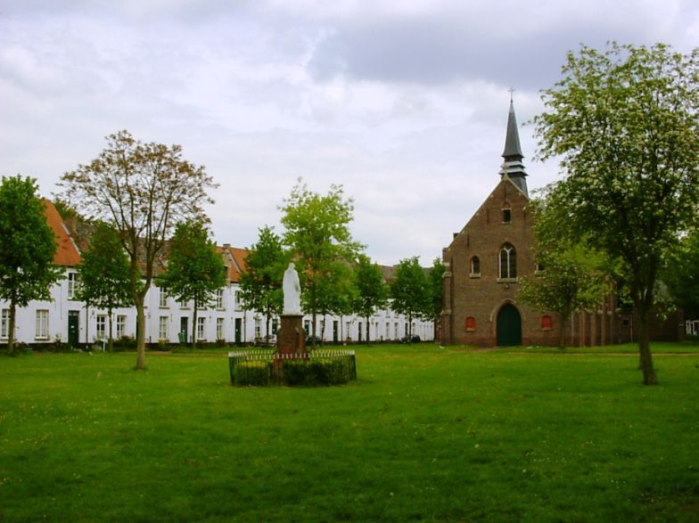 Sint-Alexiusbegijnhof Dendermonde - eigen foto